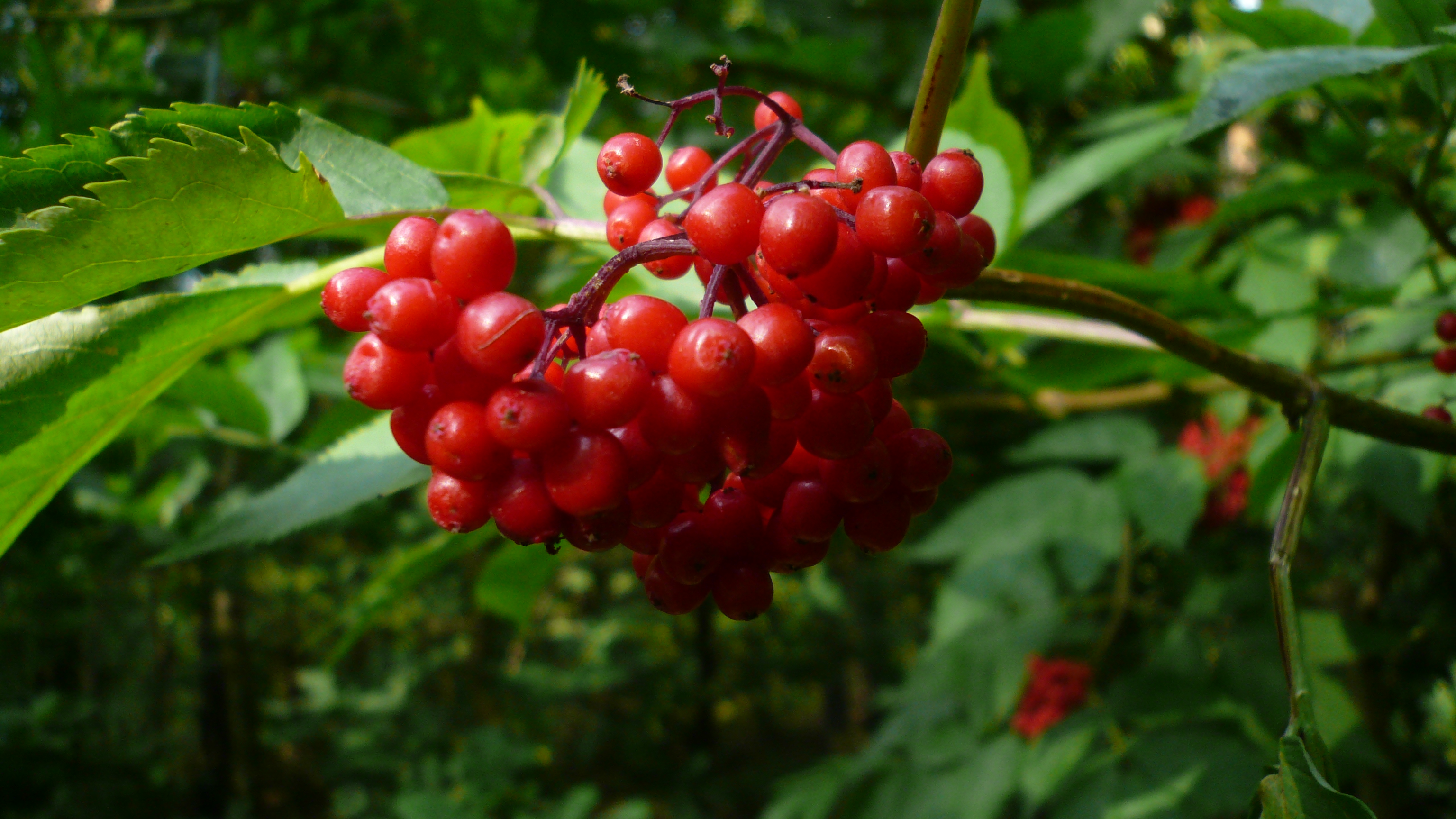 Owocostan bzu koralowego w Lesie Bemowskim